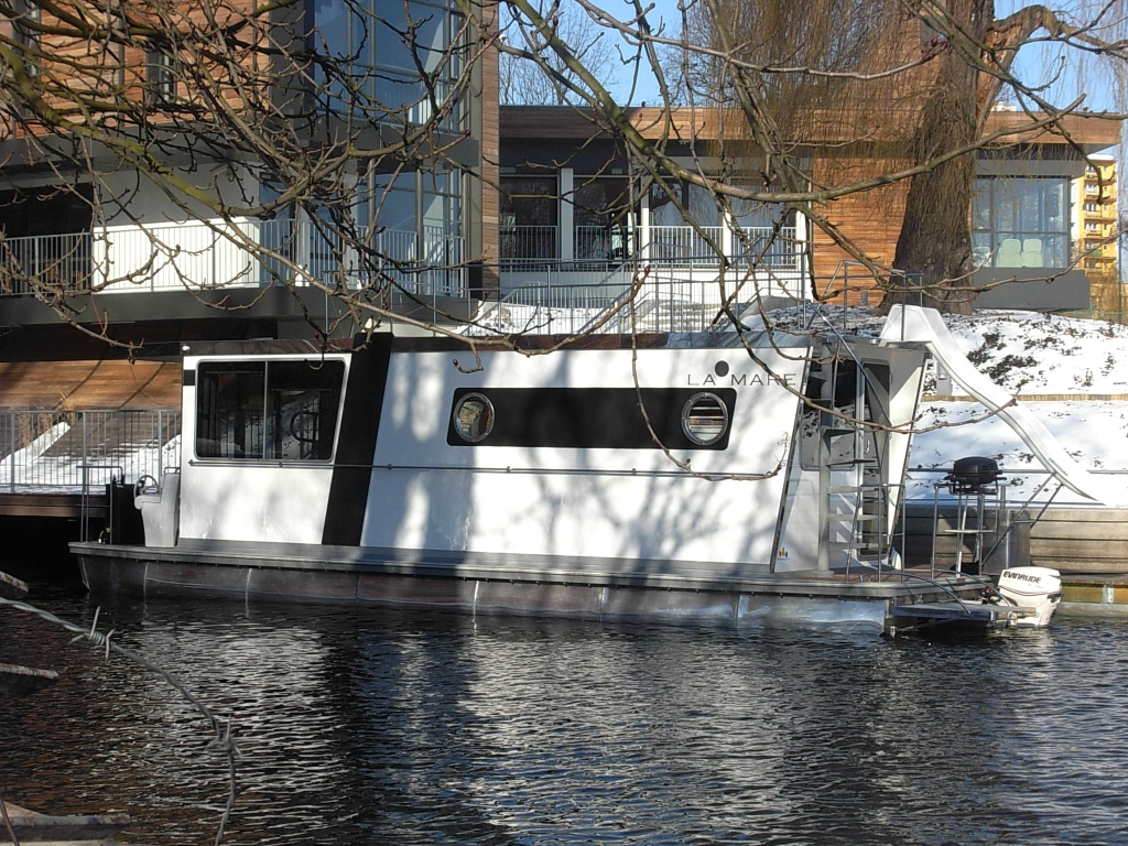 Przystań Bydgoszcz na Wyspie Młyńskiej